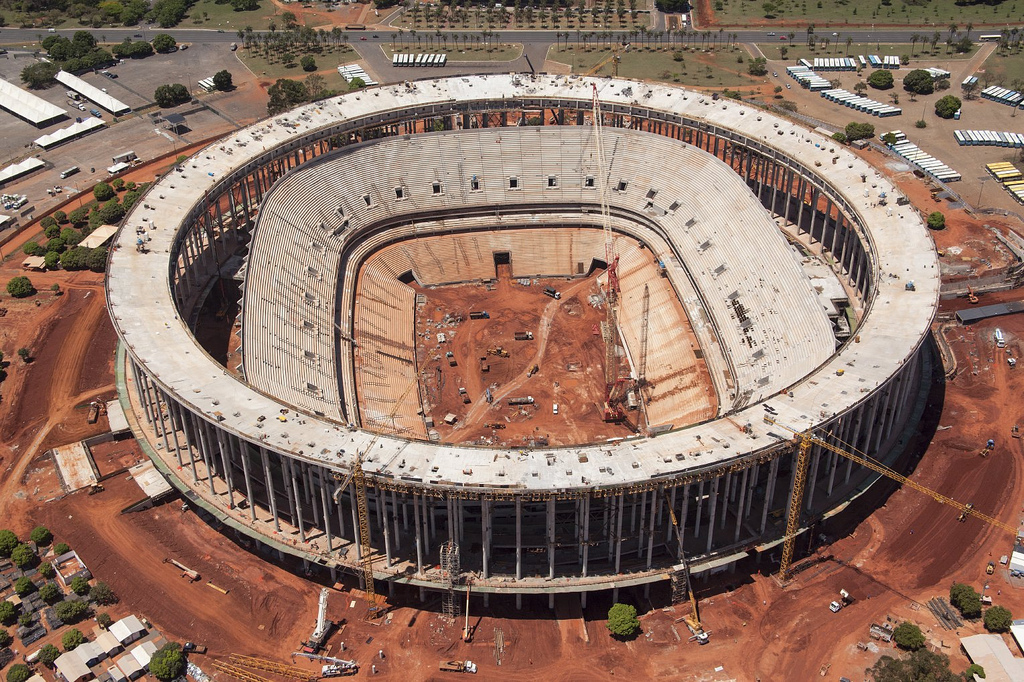 Estádio Nacional de Brasília, Brasil